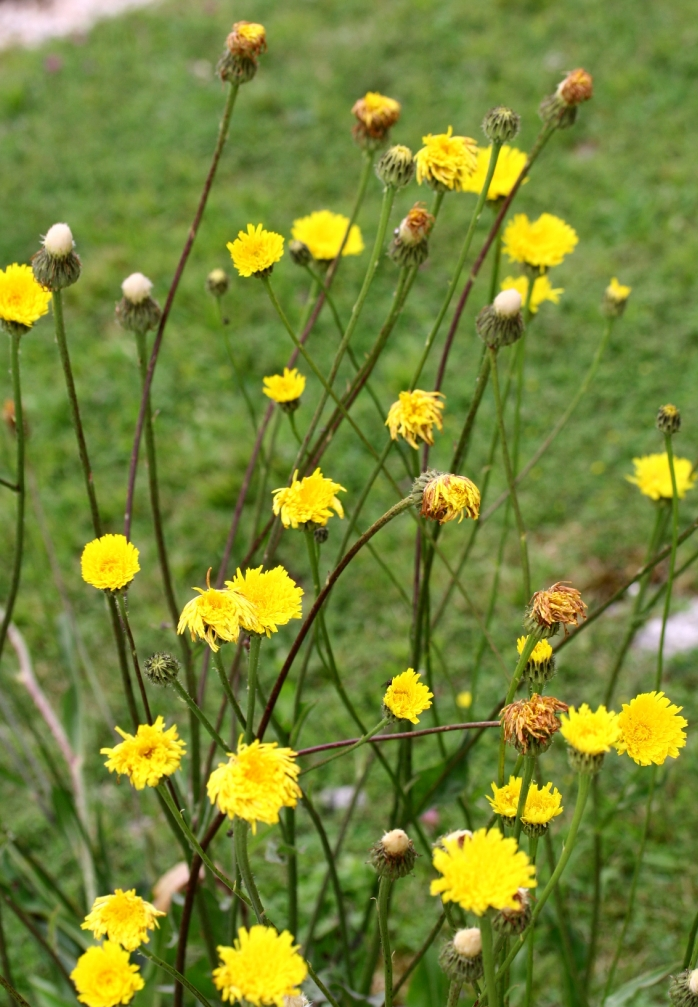 Hypochoeris_maculata (Costolina macchiata) Località : Giardino Botanico Alpino "Giangio Lorenzoni", Pian Cansiglio, Tambre d'Alpago (BL), 1000 m s.l.m.